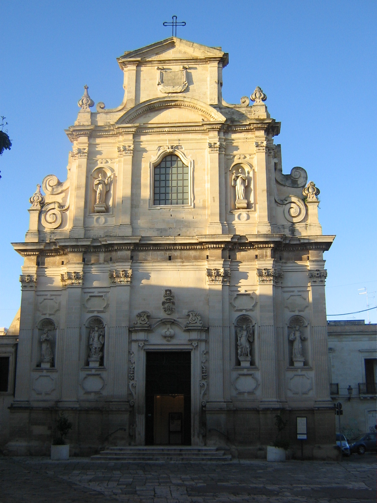 Chiesa delle Alcanterine Lecce